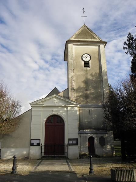 Église Saint-Roch de Pontcarré (77).